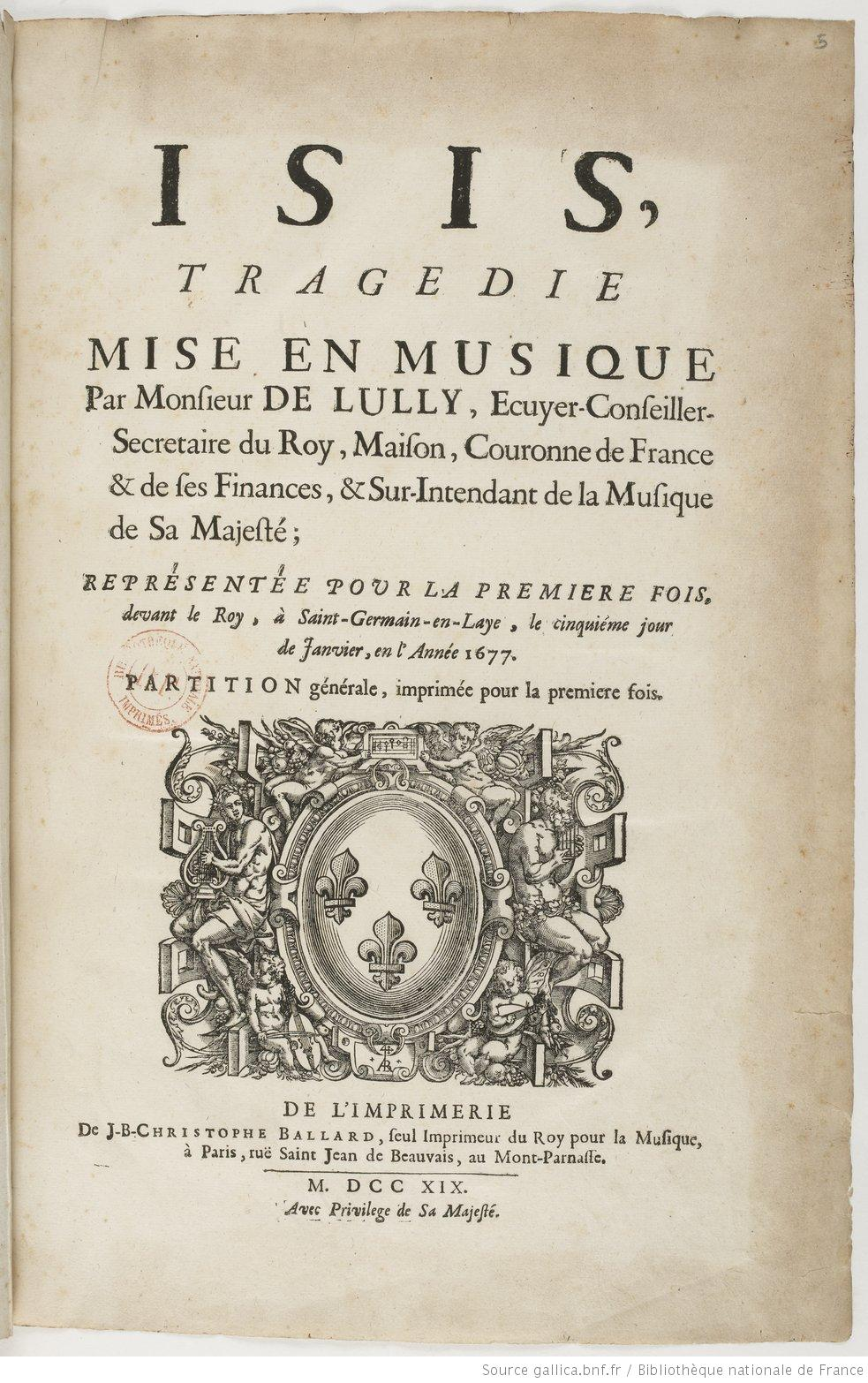 Première page du livret de la tragédie Isis de Lully, Jean-Baptiste (1632-1687). Compositeur. Partition générale, imprimée pour la 1ere fois.